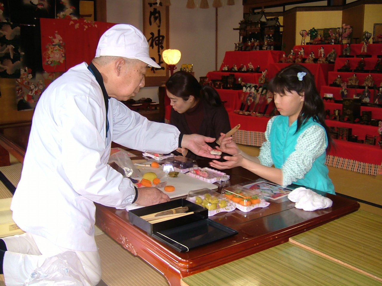 Atelier de création de hinagashi (pâtisseries emblématiques de la fête des petites filles)